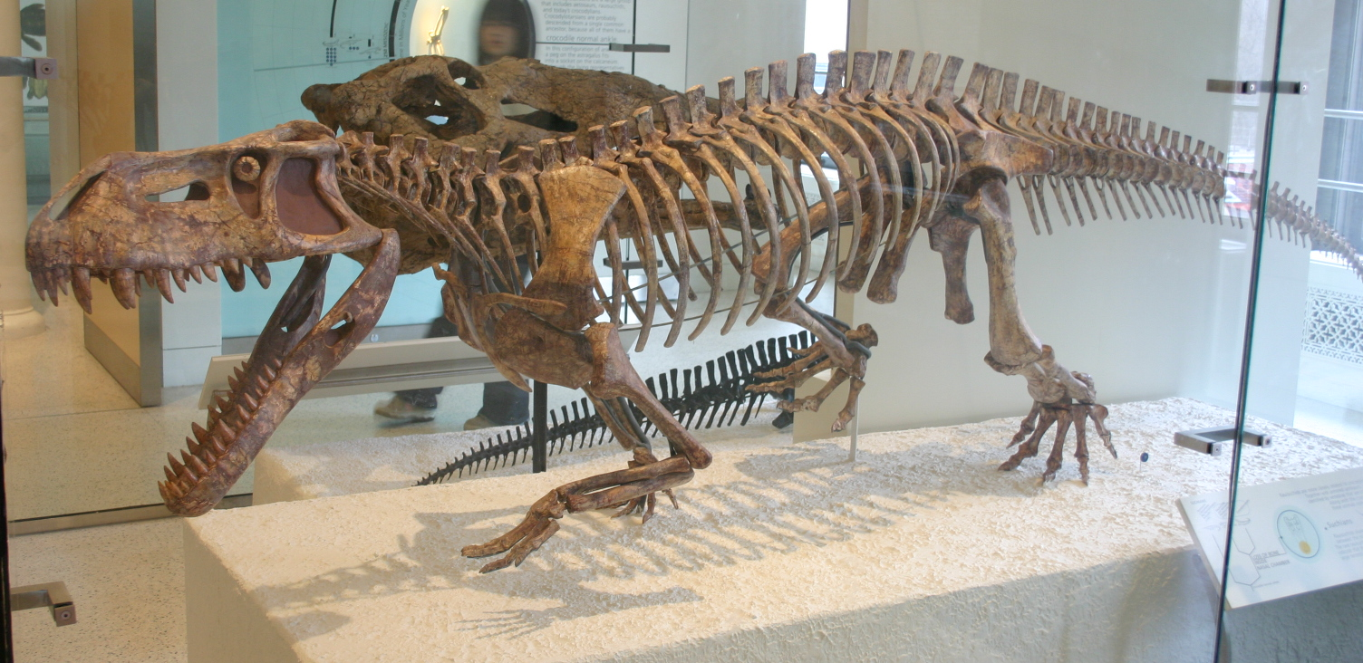 "Presto's crocodile"